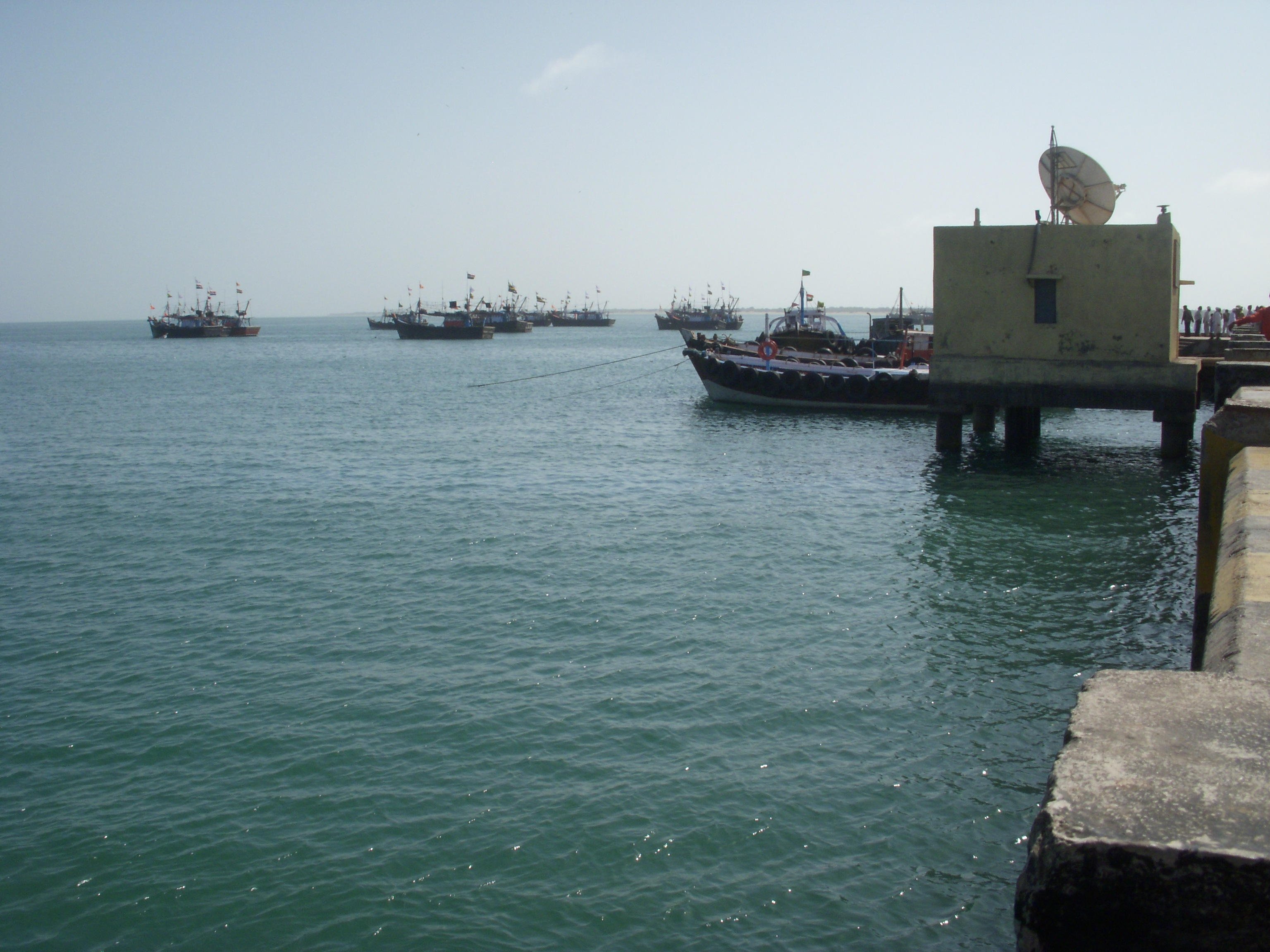 బెట్ ద్వారక సముద్రం